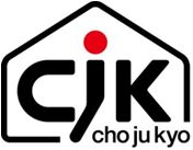 長期使用住宅部材標準化推進協議会（長住協）による長期使用対応部材（CjK部材）